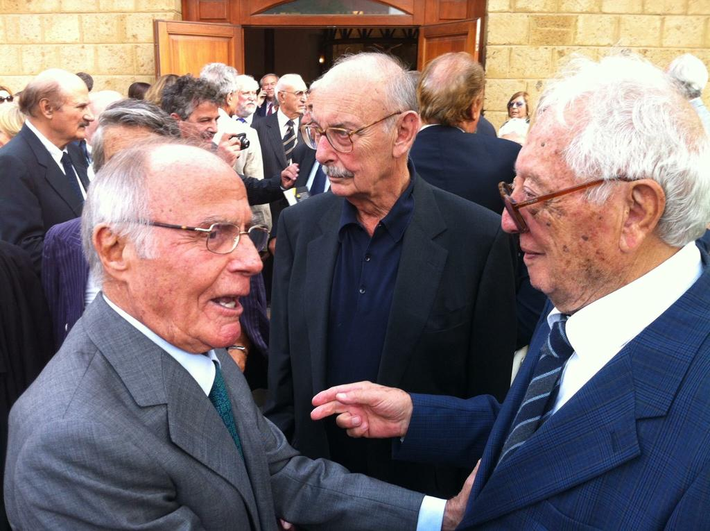 Da sinistra Tuto Stagno e Aldo Falivena ai funerali di Brando Giordani. 26 settembre 2012